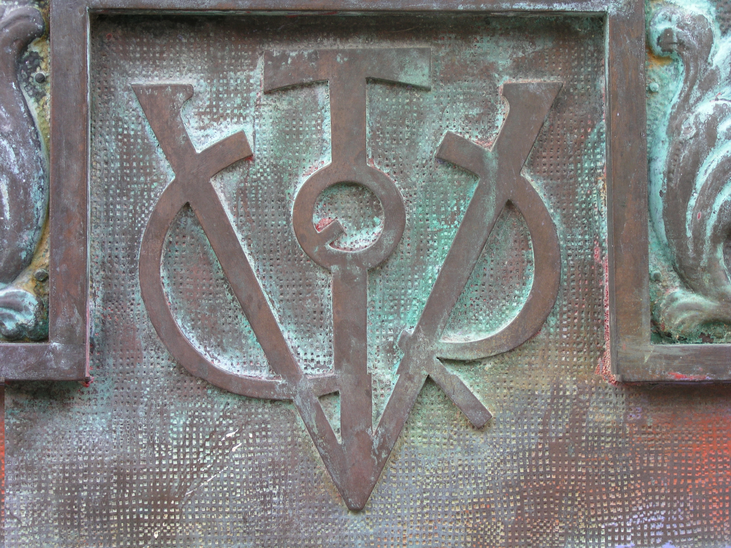 Detalle de la placa con el emblema personal de Francisco Franco.